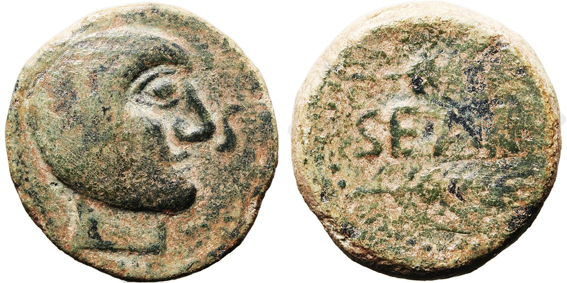 Semis de bronce acuñado en Searo o Siarum, cerca de la actual Utrera (provincia de Sevilla, España). Muestra la leyenda "SEARO" entre espigas.